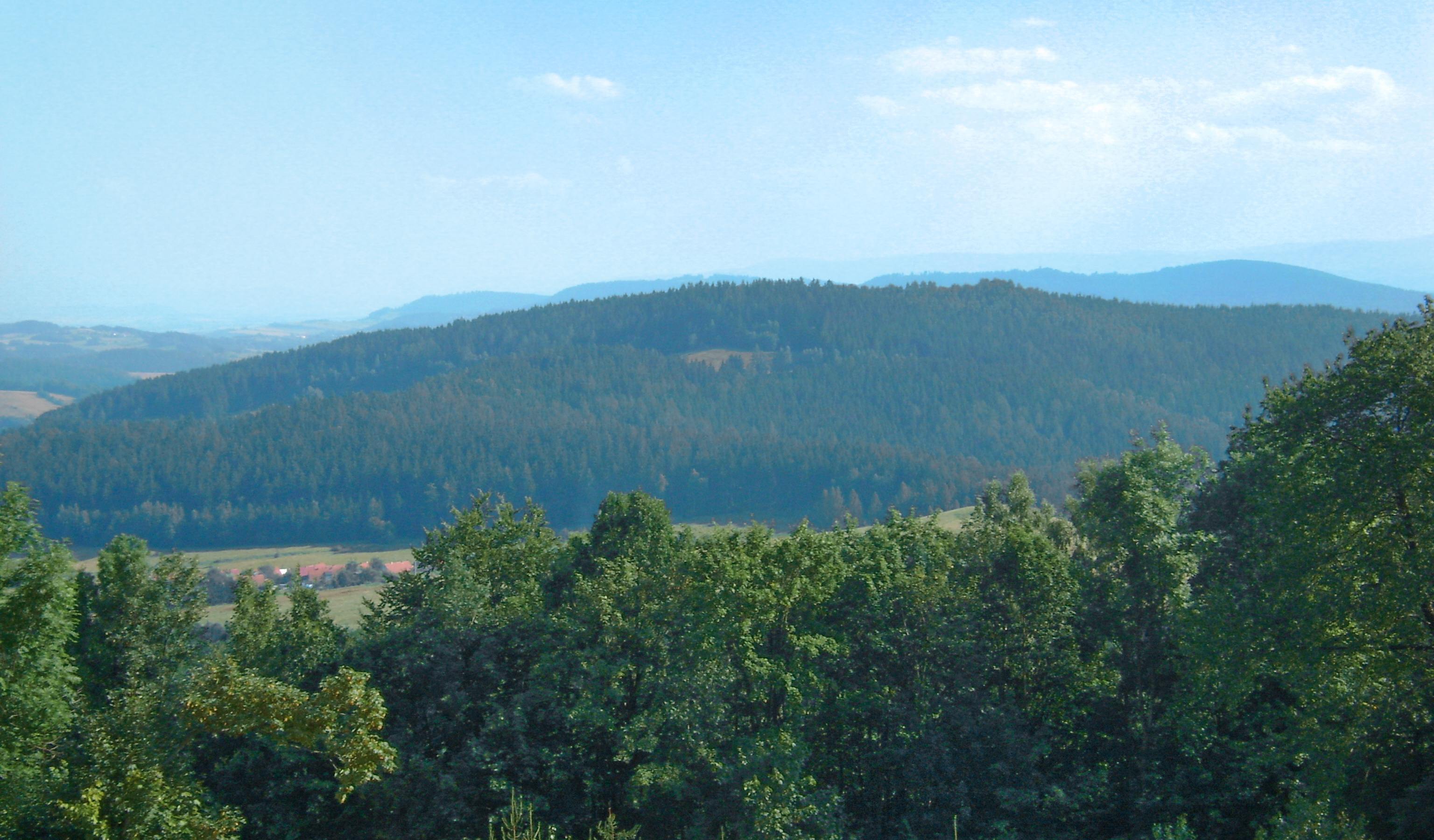 Włodyka wzniesienie w południowo-zachodniej Polsce na Wzgórzach Wyrębińskich (Góry Sowie) woj. dolnośląskie - widok ze zbocza Grabiny z drogi na Przełęcz Jugowską